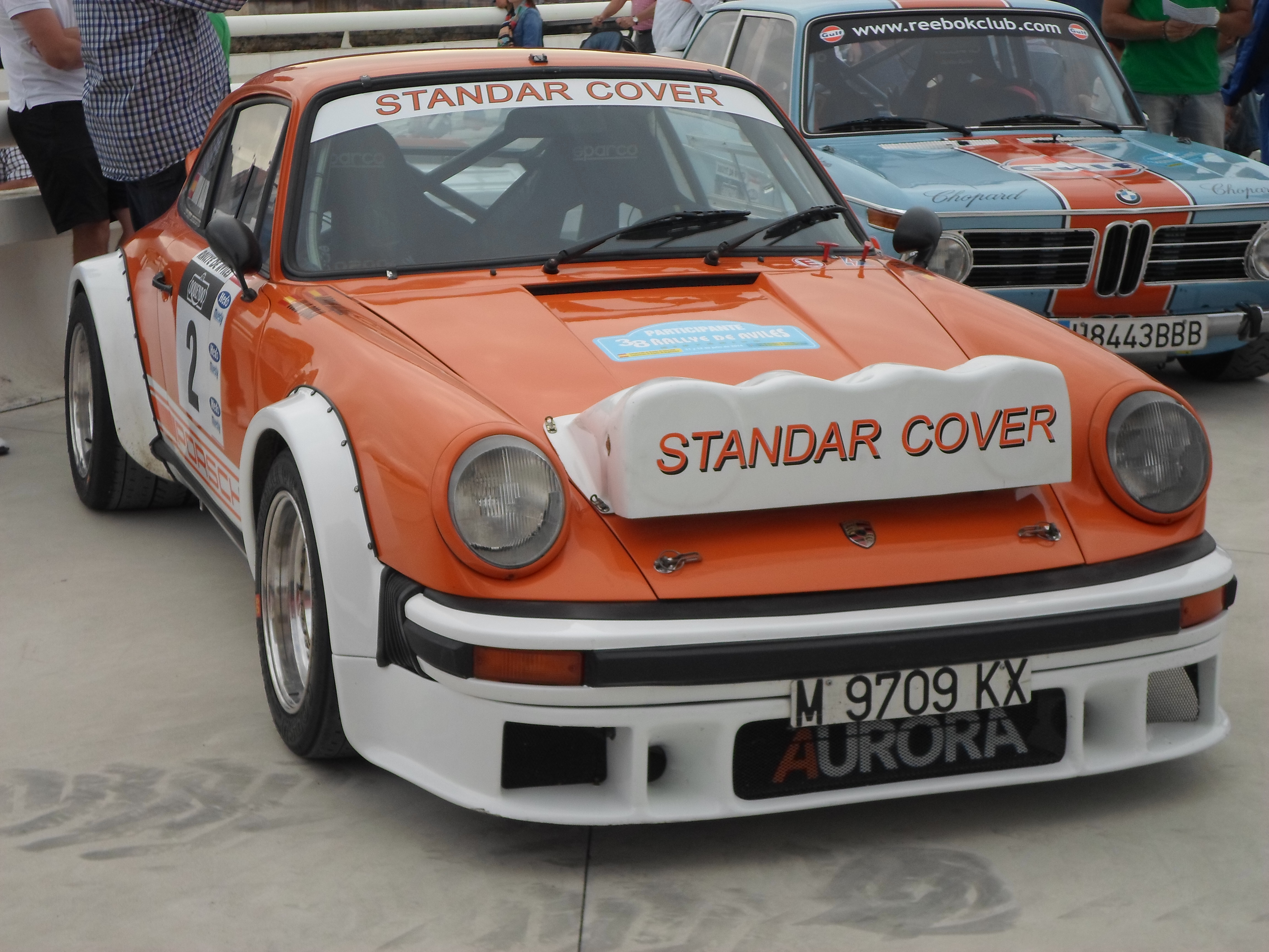 JUlio Borja (Porsche Carrera SC) rally de aviles 2014